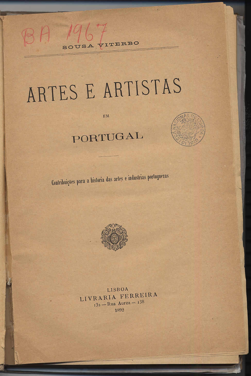 Artes e artistas em portugal : contribuições para a história das artes e industrias portuguezas / Sousa Viterbo. - Lisboa : Livraria Ferreira, 1892. - 312 p. ; 24 cm